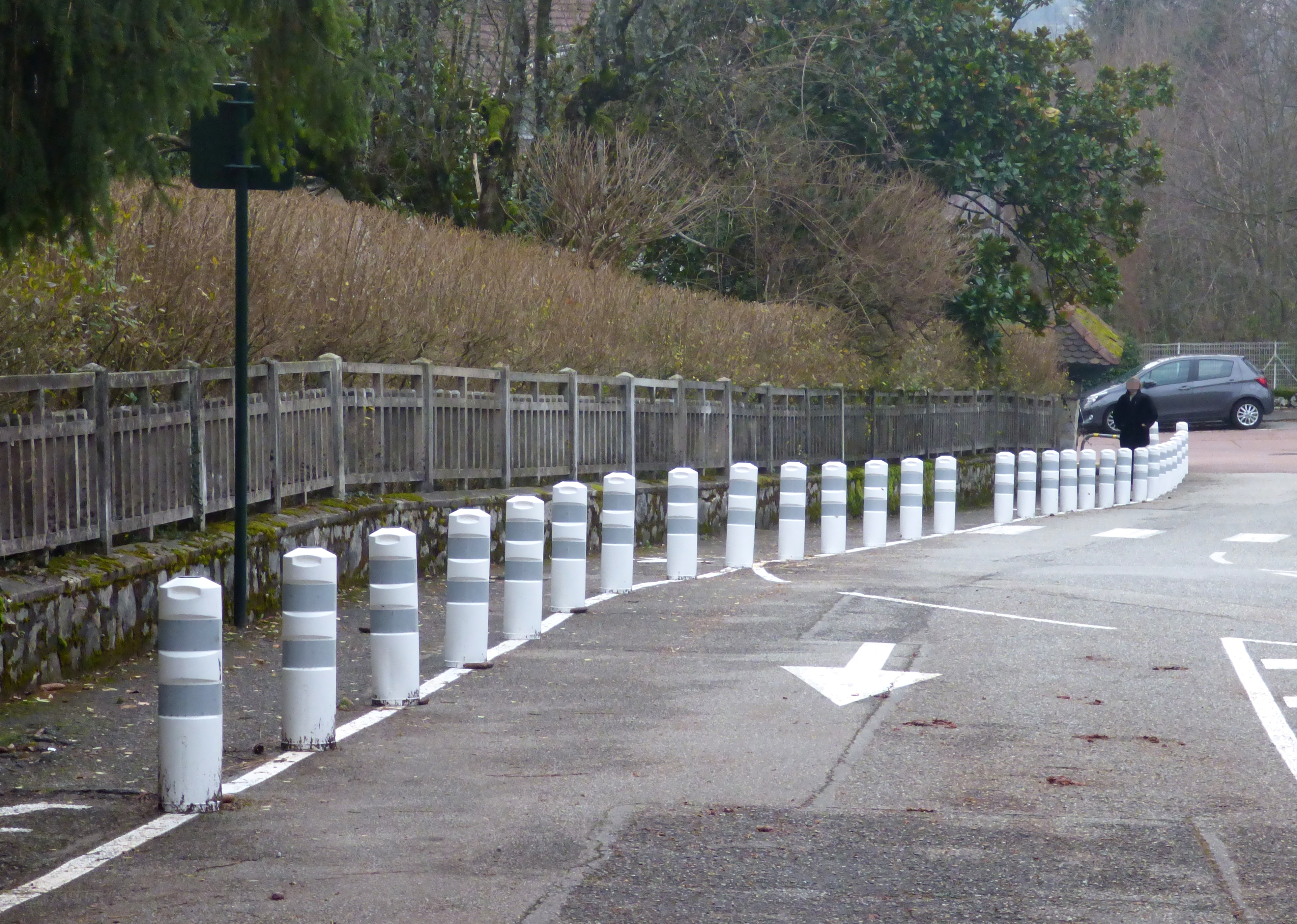 Sécurisation et délimitation de la voirie à l'aide de balises de type J11.